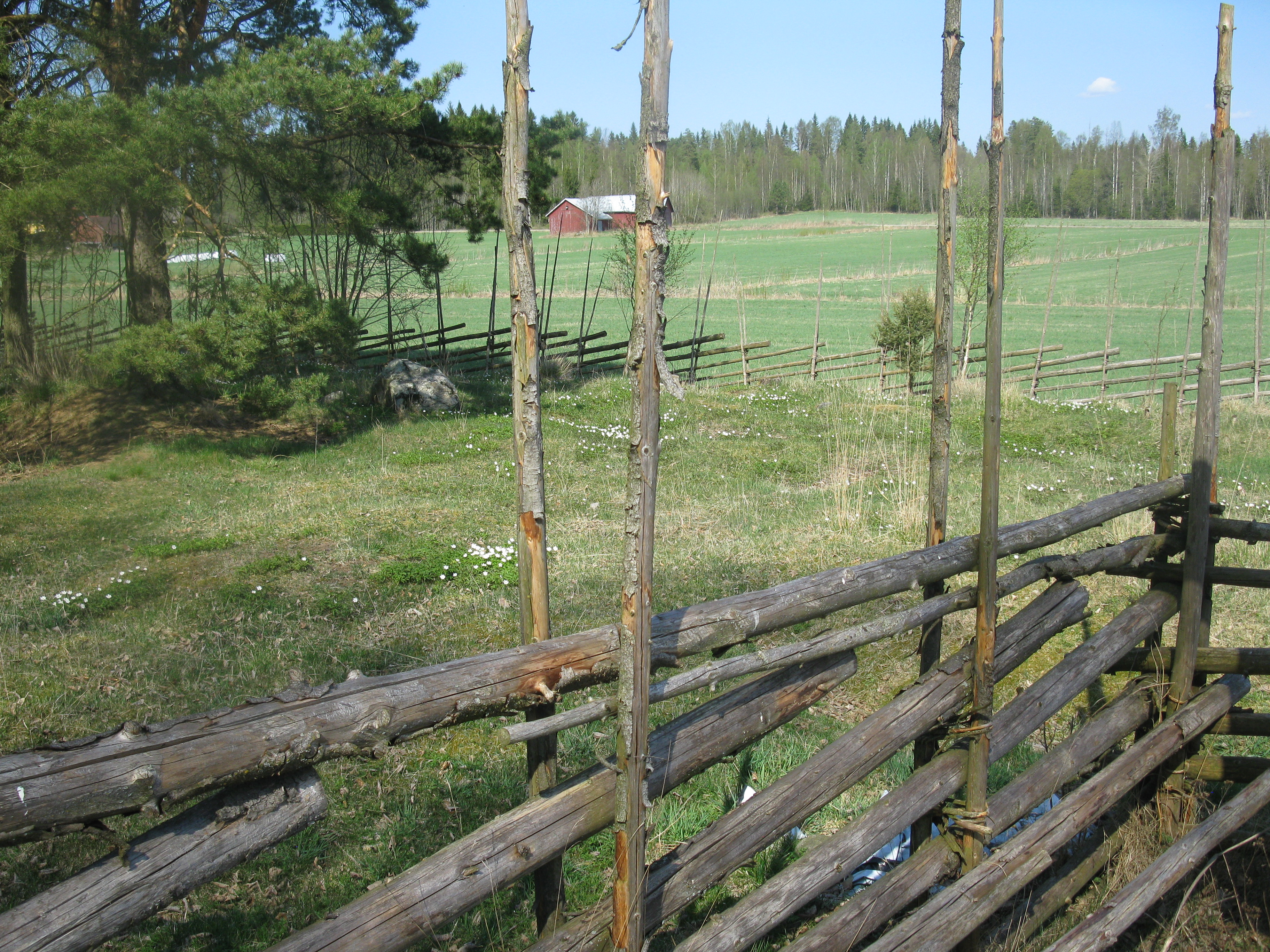 Levajärven laidunaluetta Kullaan Levanpellossa Ulvilassa.